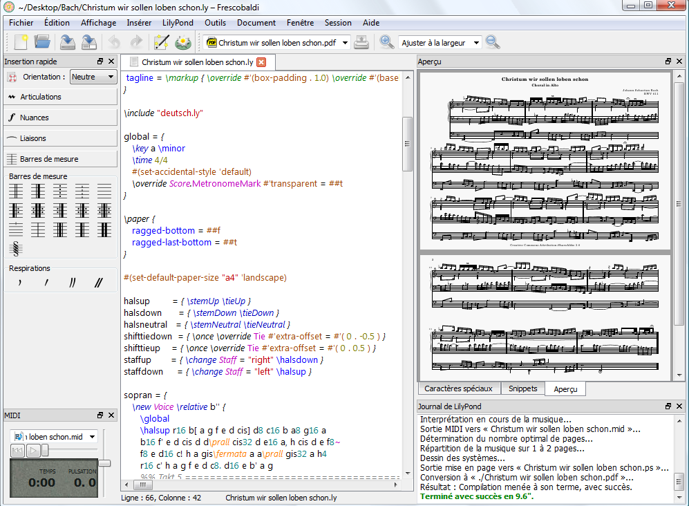 Capture d'écran de l'éditeur de partitions Frescobaldi